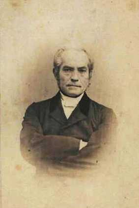 Foto af Hans Schneekloth (19.jun.1812-11.dec.1882), skolemand i København.